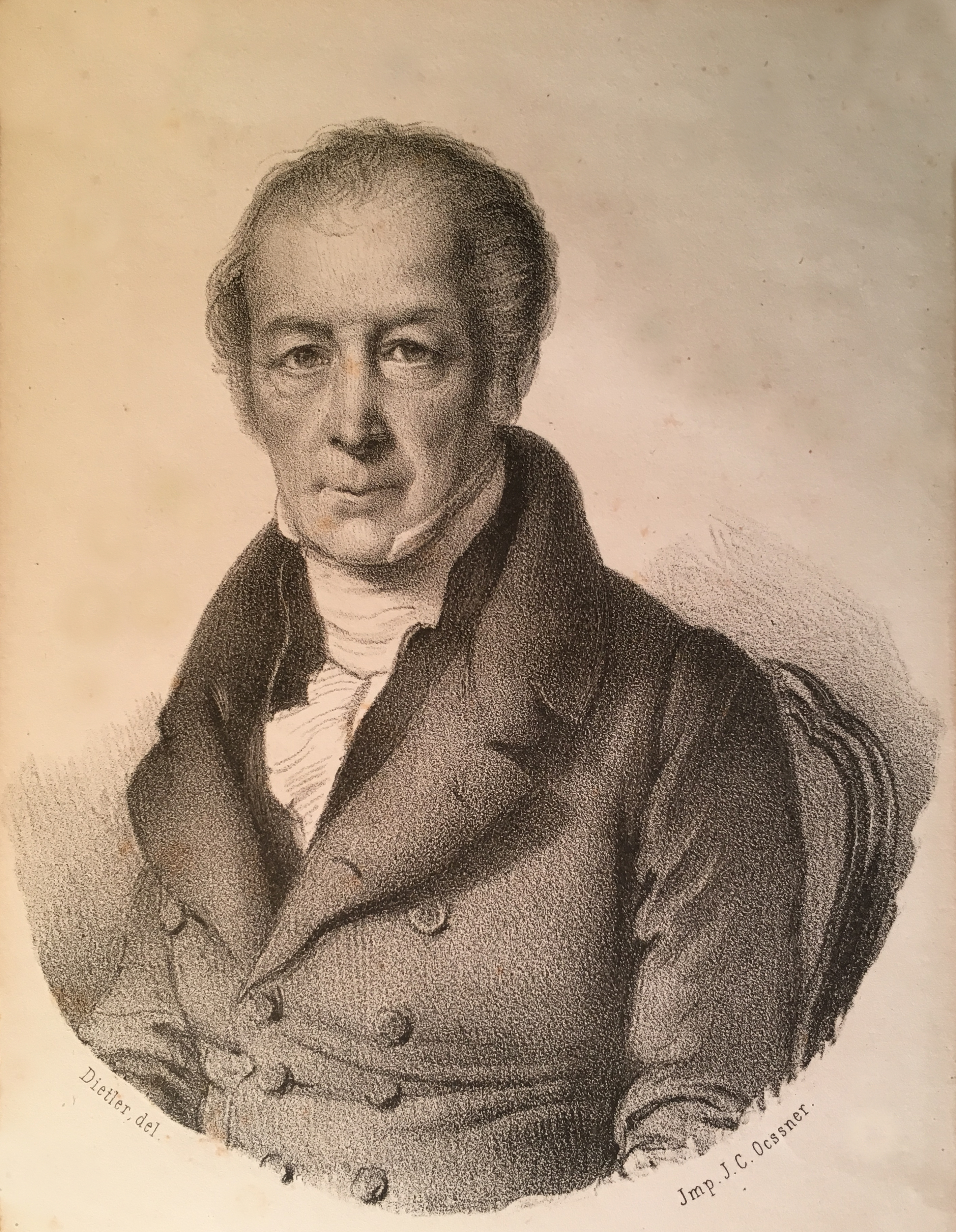 Bildnis Albrecht Friedrich May